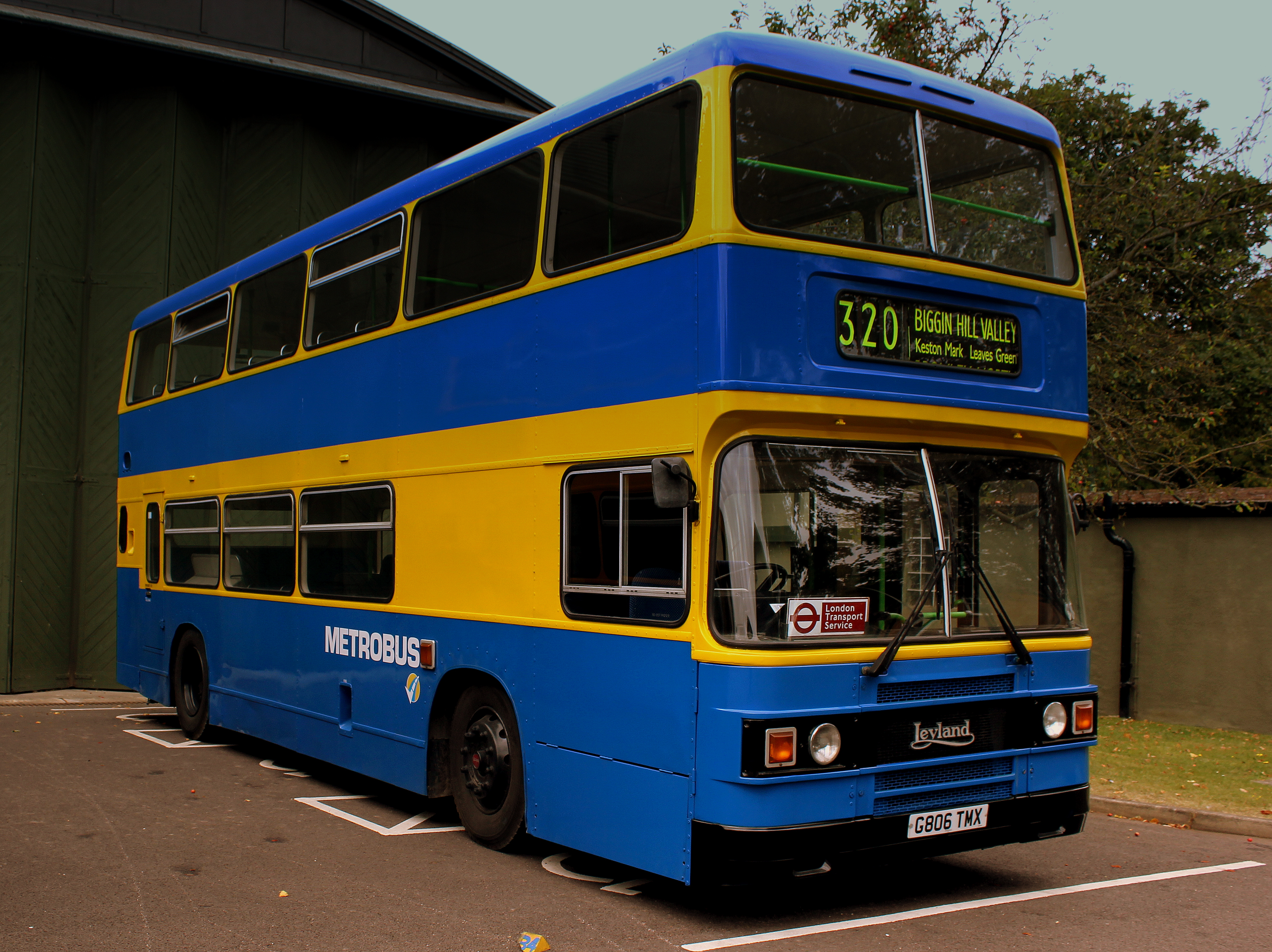 METROBUS LEYLAND OLYMPIAN SHOWBUS DUXFORD SEP 2012